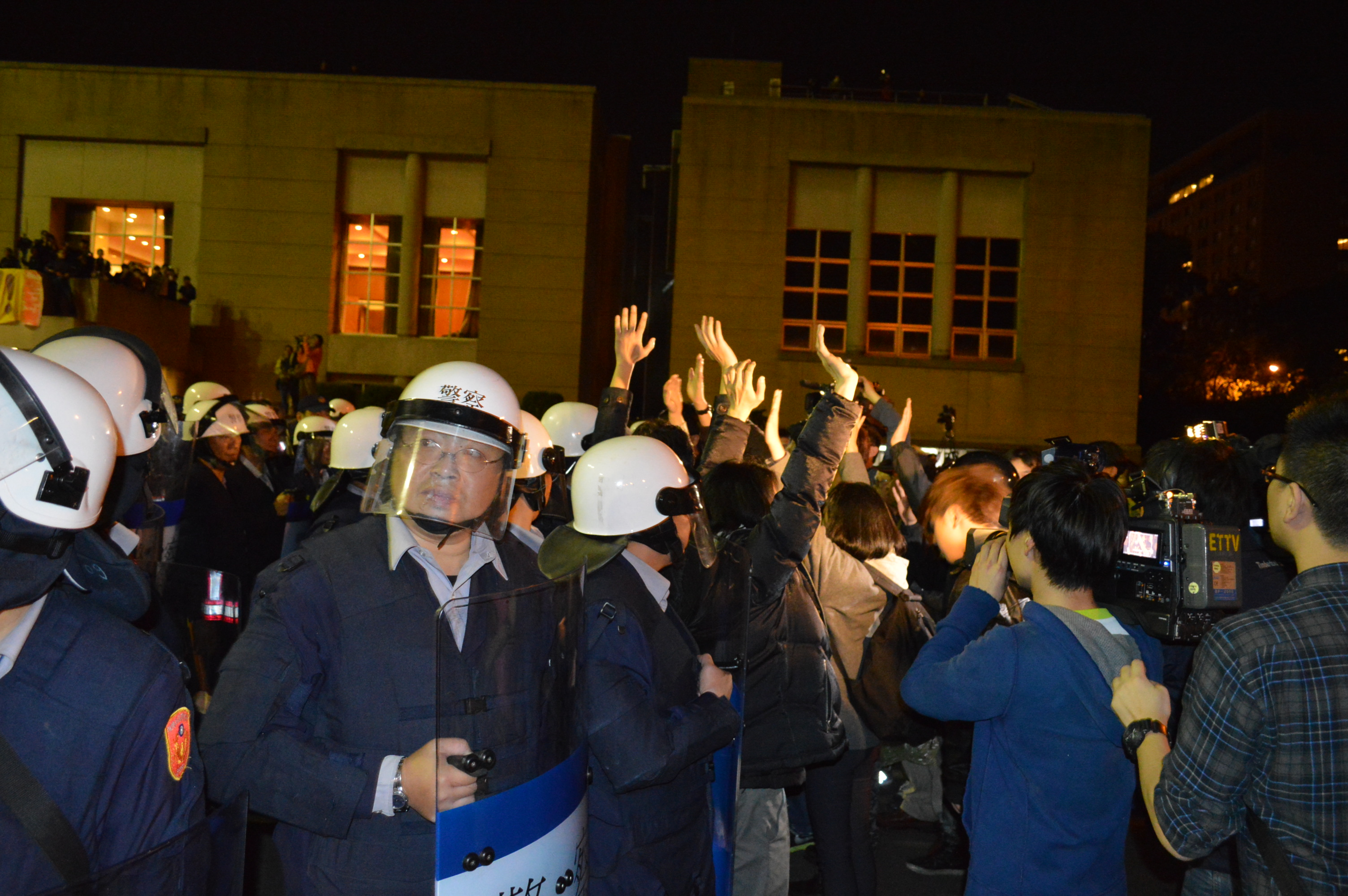 防暴警察和抗議者對峙。